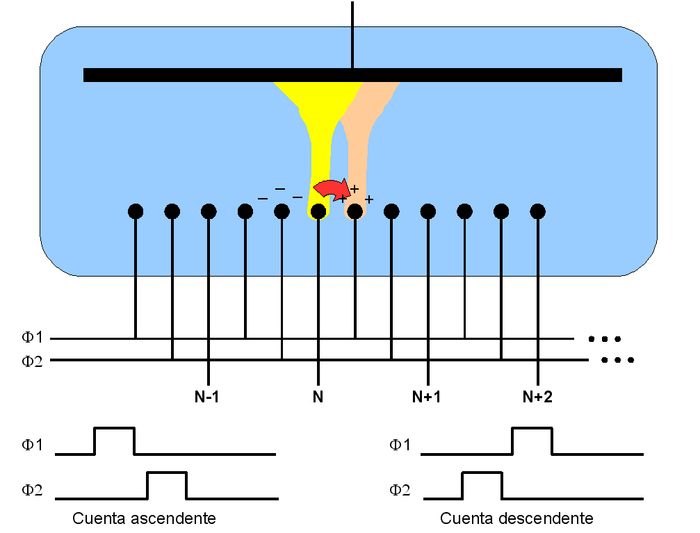 Funcionamiento del decatrón